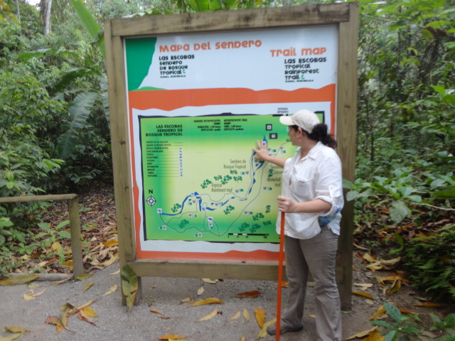 Inicio del Sendero Las Escobas